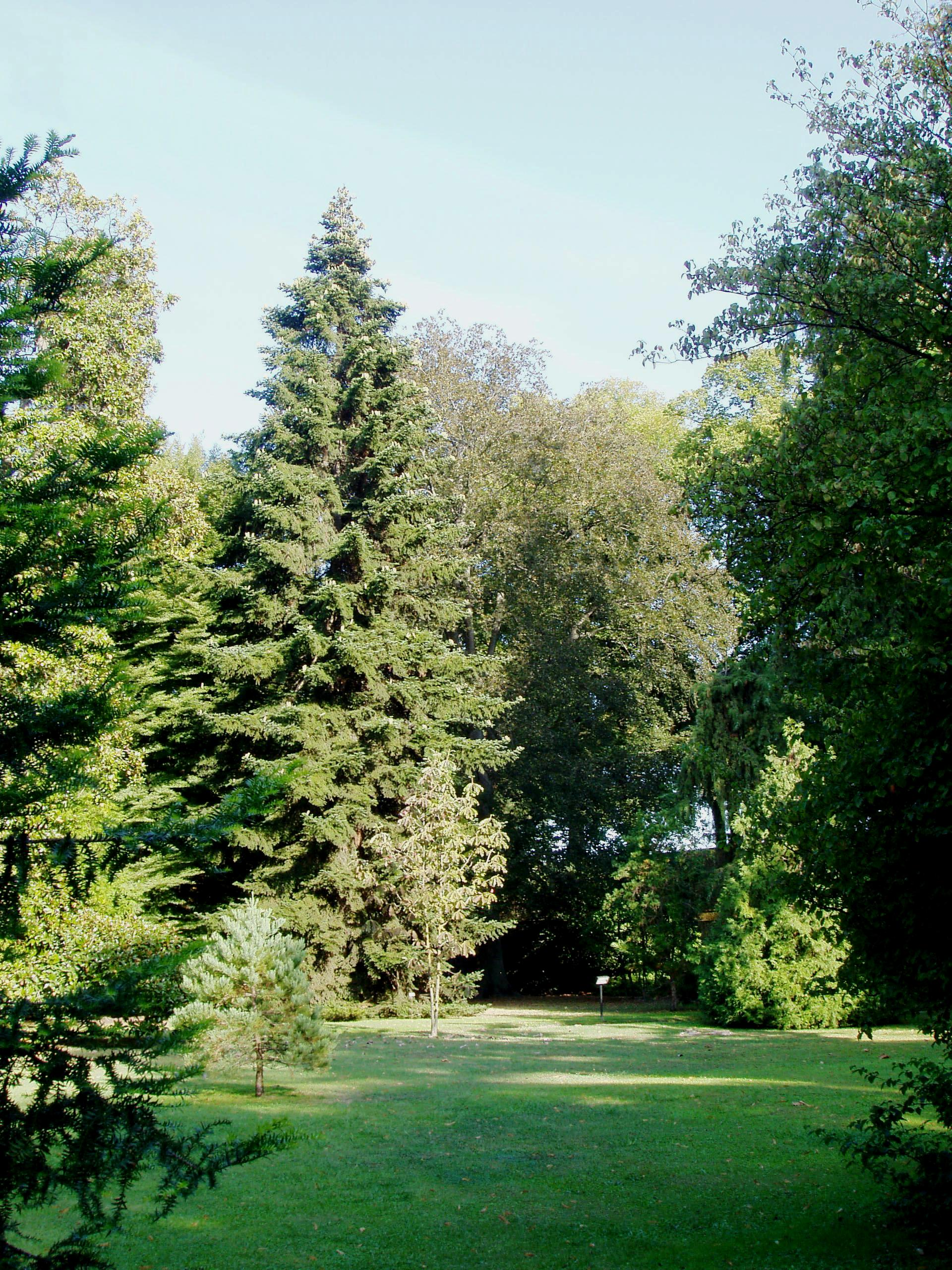 Orto Botanico Comunale di Lucca - general view. Lucca, Italy.